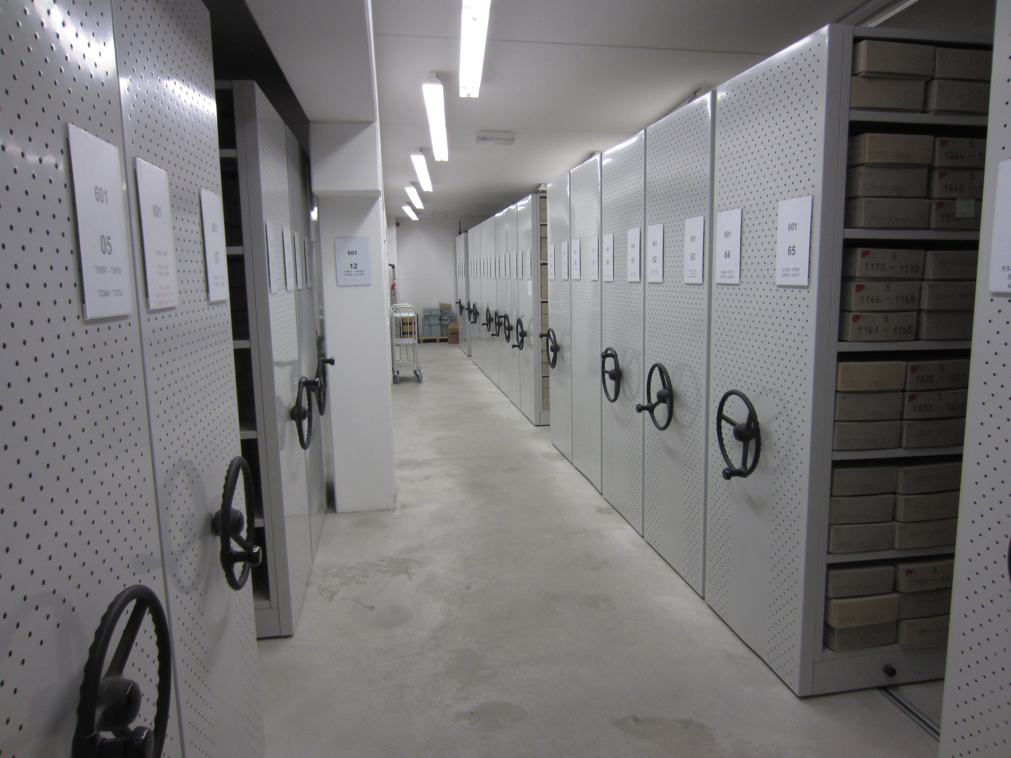 Magazin im EZA